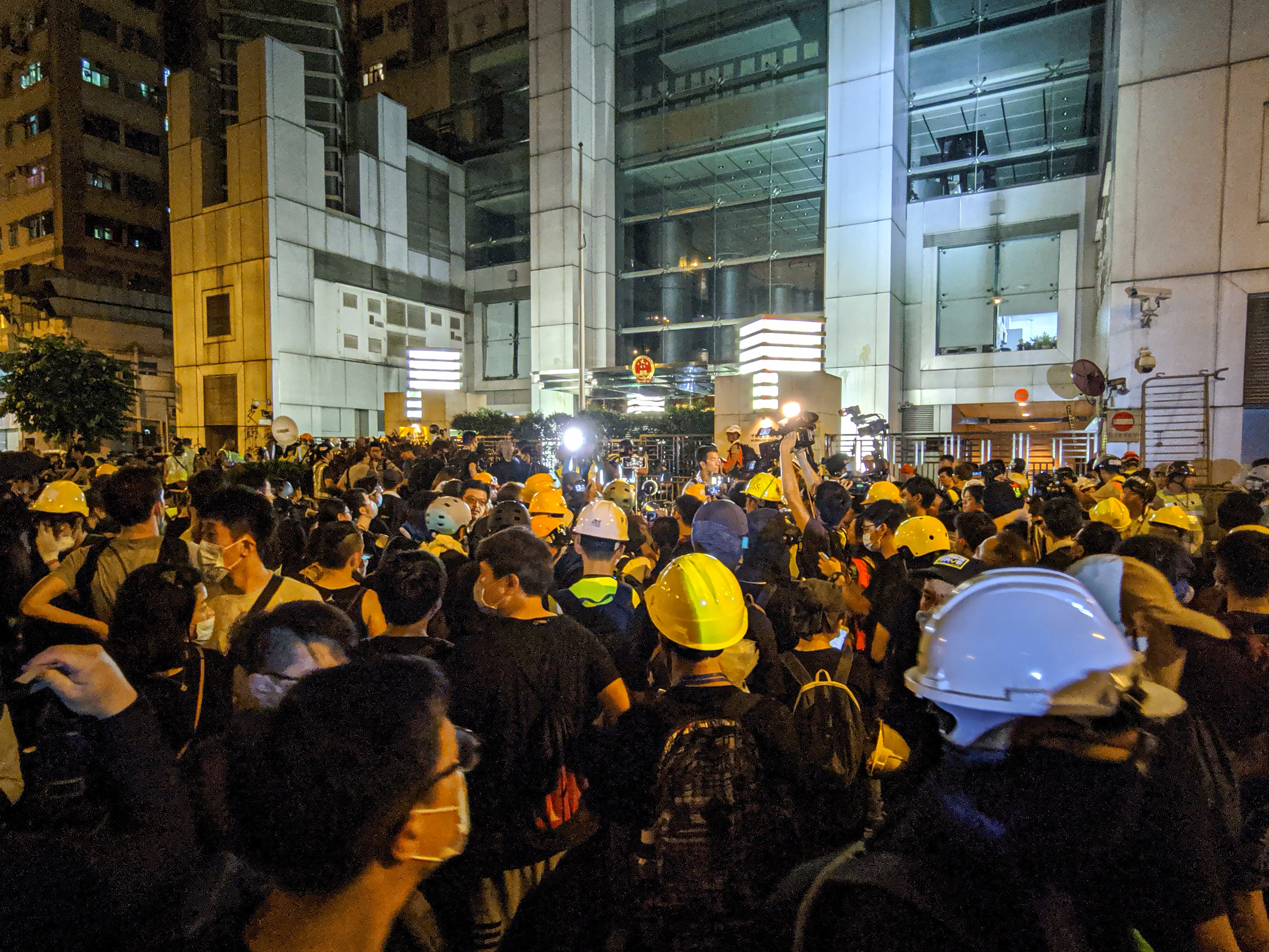 2019 Hong Kong anti-extradition law protest on 21 July 2019, captured by Studio Incendo from Flickr.